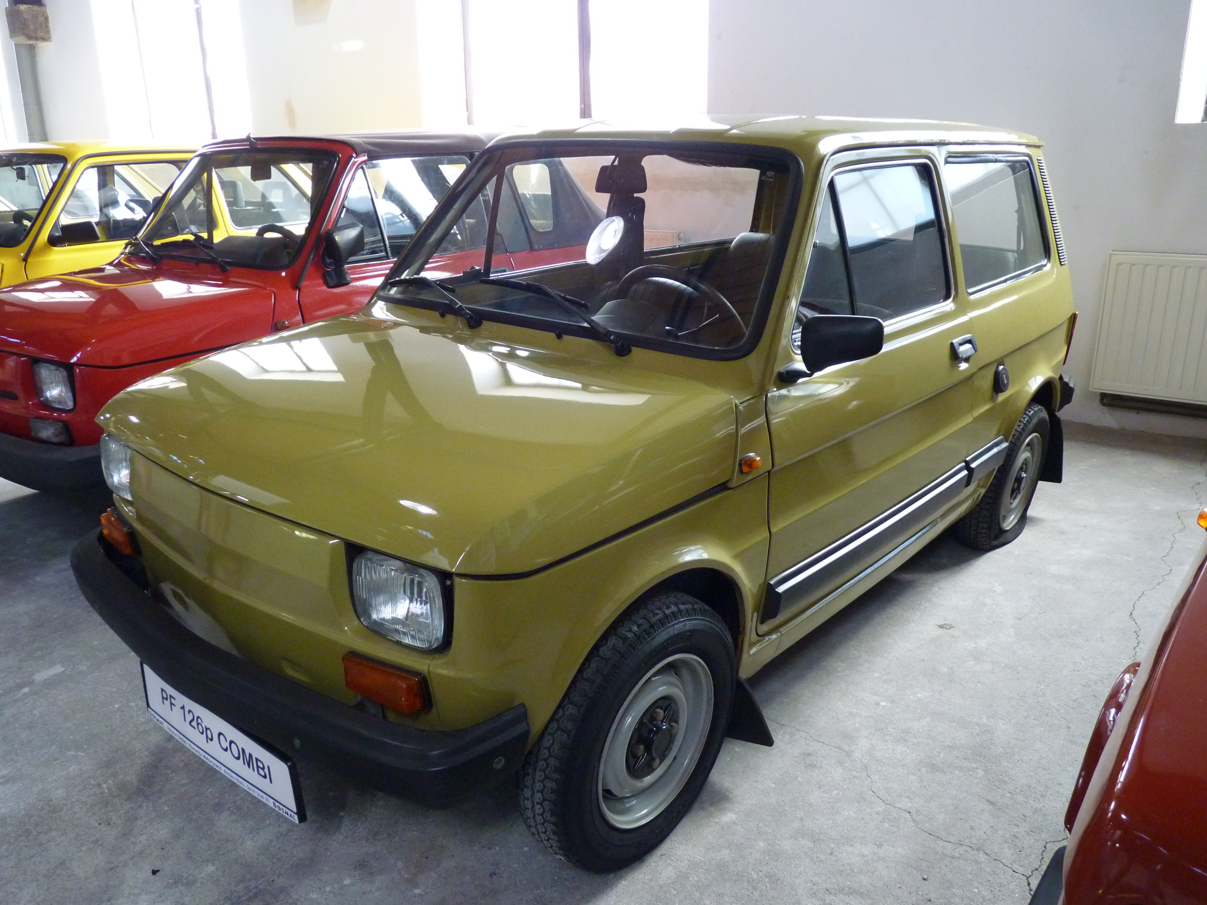 Muzeum Inżynierii Miejskiej